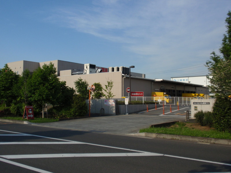 ぎょうざの満州 本社・工場 （坂戸市）